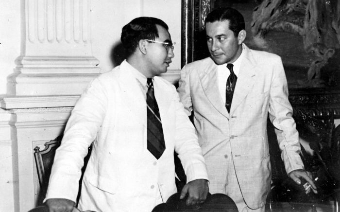 Negatief. Ide Anak Agung Gde Agung in gesprek met Sultan Hamid II van Pontianak